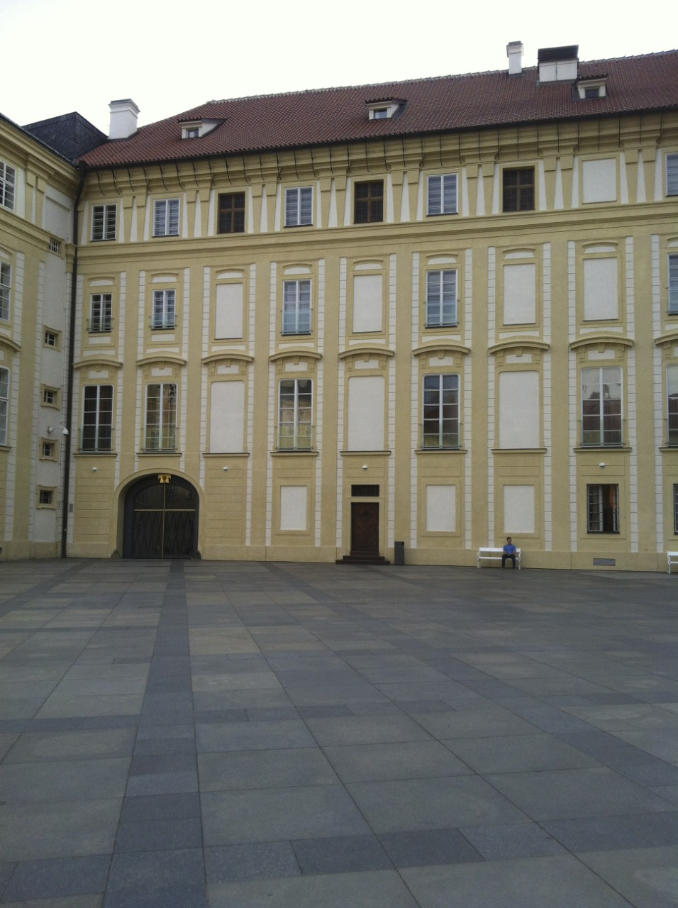 JZ kout III. nádvoří Pražského hradu. Průjezd je v místě původního západního vstupu do hradu, který strážila Bílá věž zbudovaná za Soběslava po r. 1135. Její zdivo je skryté za klasicistní fasádou a slepými okny, vchod vpravo od průjezdu je uprostřed (v ose) věže.